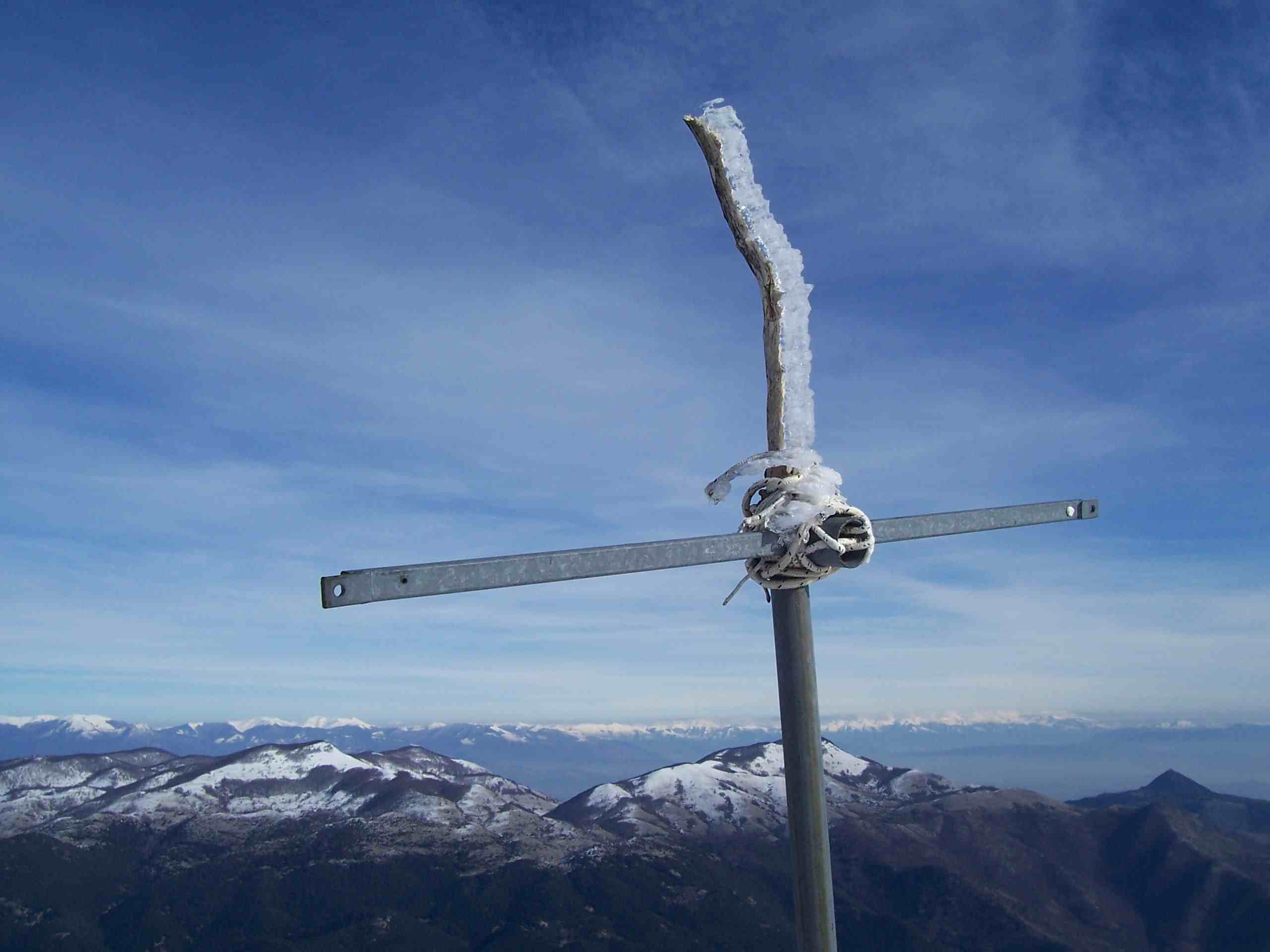 Monti Lepini (Lazio) Foto scattata da me (Pepp.cristiano 18:38, 16 giu 2006 (CEST), Giuseppe Cristiano) la rilascio nel pubblico dominio